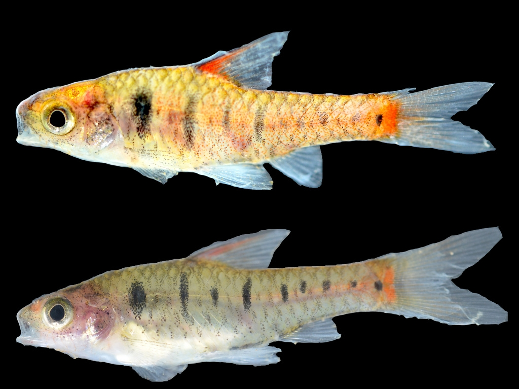 Barbus jae, male and female